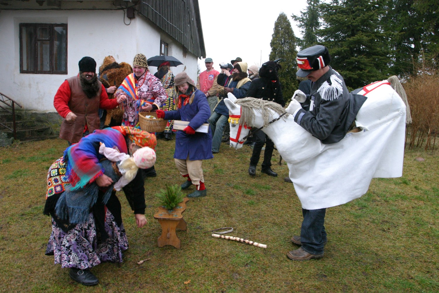 Šyvio šokdinimo paprotys, Gražiškiai, Vilkaviškio raj., Lietuva